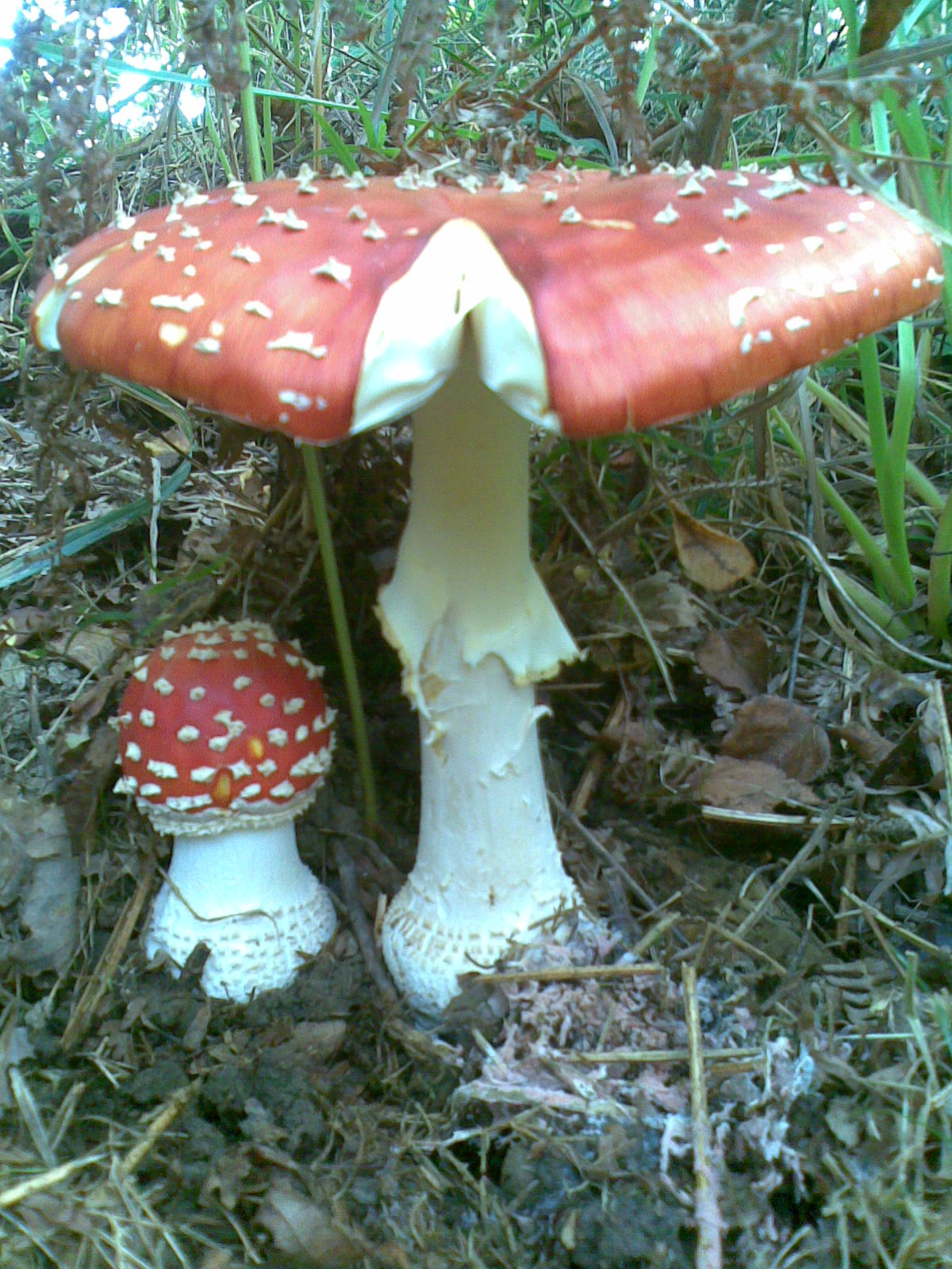 Une maman amanite tue-mouches et son bébé.